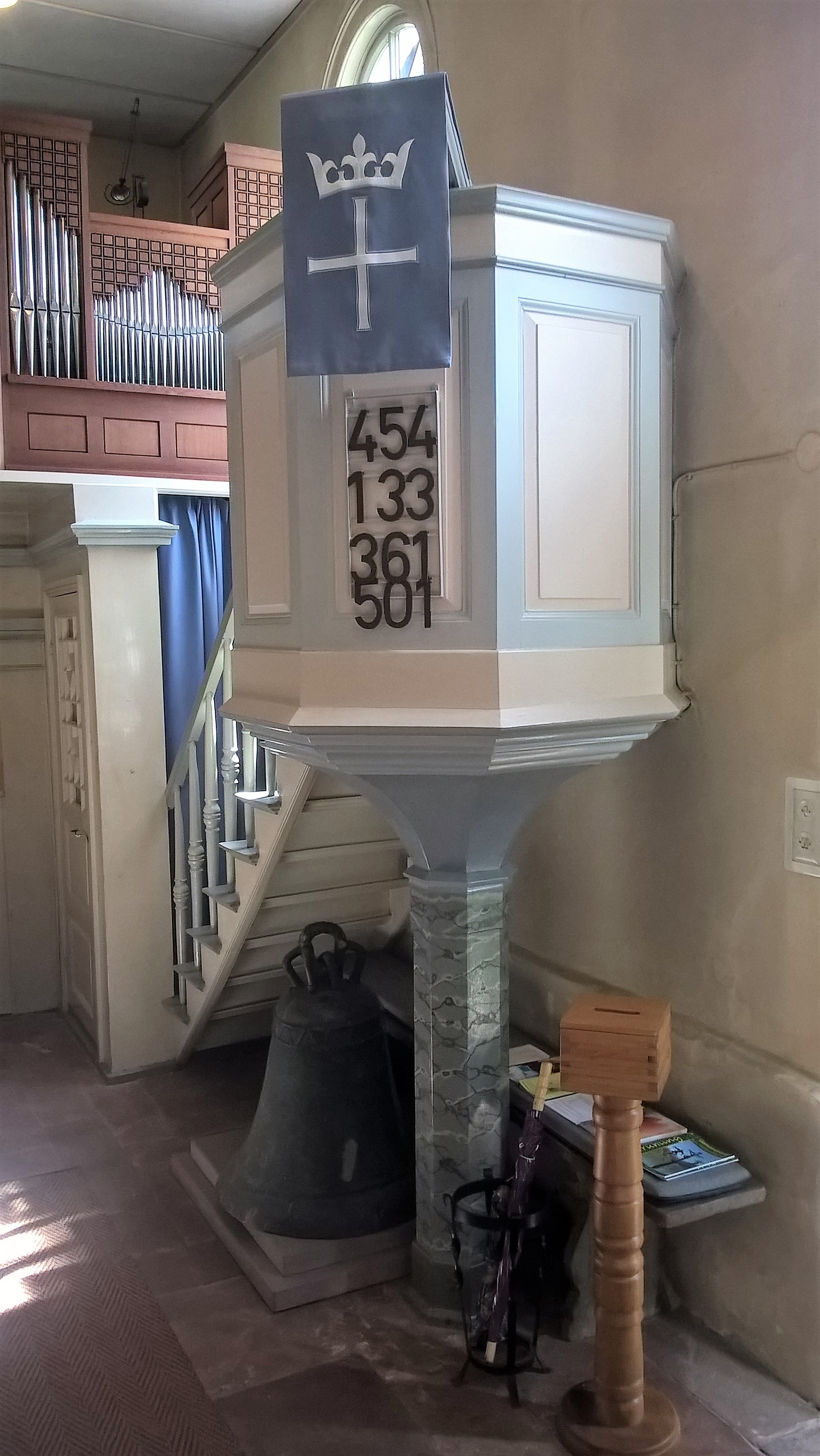 Evangelische Kirche Römershausen (Gladenbach), Landkreis Marburg-Biedenkopf, Hessen, Deutschland